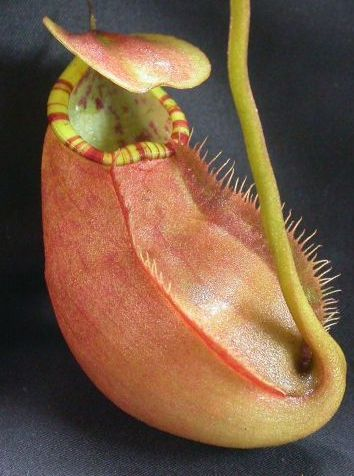 Cultivated N. sumatrana. -Jeremiah